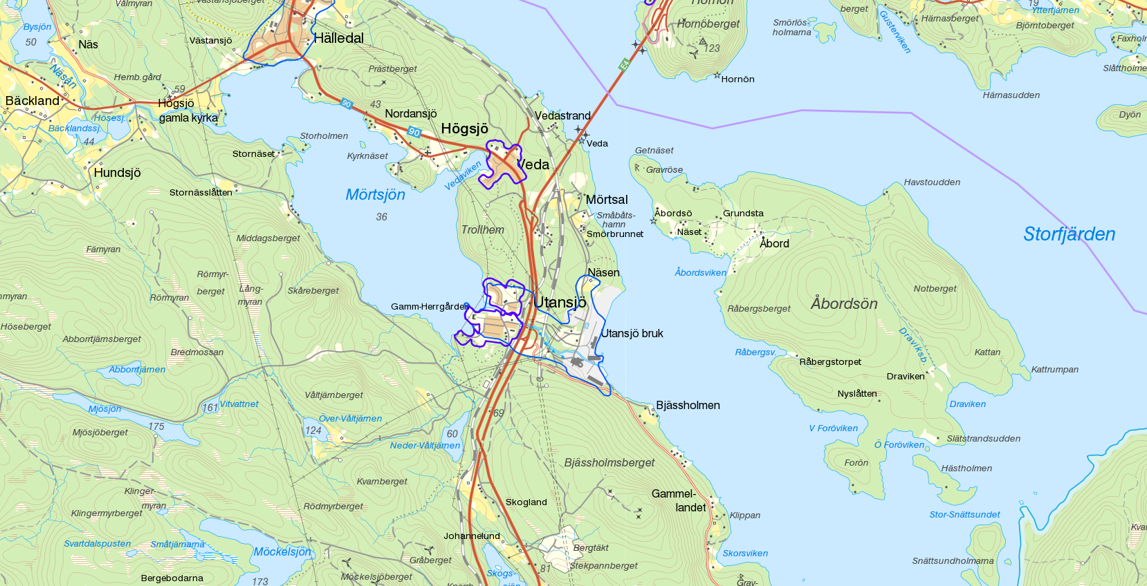 Tätorten Utansjö med gränserna från Statistiska centralbyråns tätortsavgränsning 2010 i svart tillsammans med småorterna i Utansjö från SCB:s småortsavgränsning 2015 i lila. Bakgrundskarta från Lantmäteriet, skala 1:30 236. På kartan syns småorten Veda.